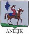 Het wapen van Andijk. De man op het paard stelt een dijkwacht voor, deze was er in vroegere tijden omdat het erg kon stormen op de toenmalige Zuiderzee. Deze wacht moest de dijken in de gaten houden, of de dijken niet doorbraken.